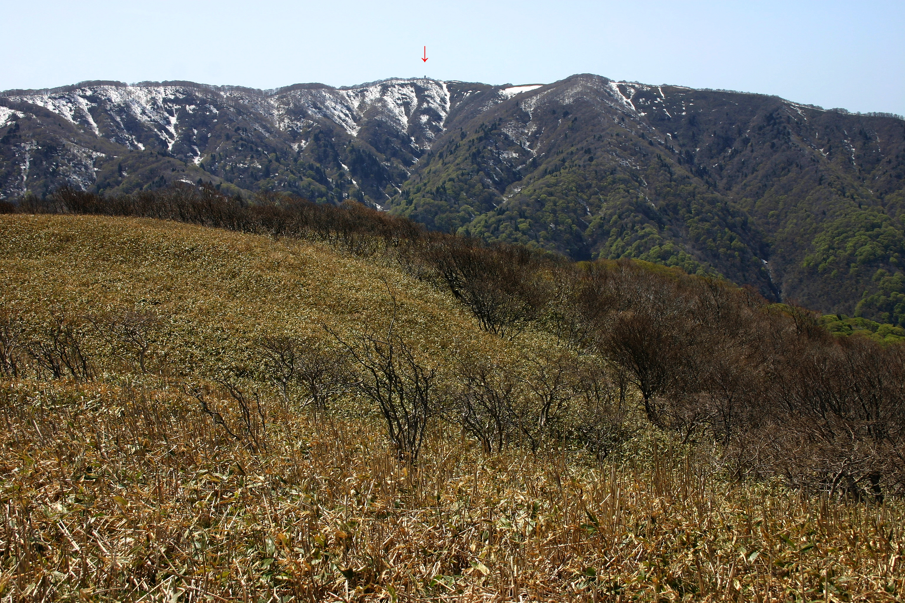 大谷山から見た大御影山、赤矢印が山頂。